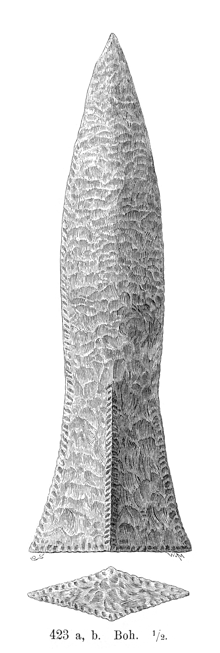 Senneolitisk flintdolk från Övre Knaverstad, Solberga socken, Inlands Nordre härad, Kungälvs kommun, Bohuslän, Västra Götalands län, Sverige.